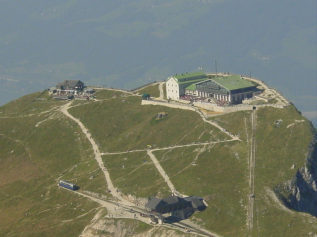 aerial photo of Schafberg (Austria) (Schafberg rack railway and hotel) / Luftaufnahme Schafberg (Österreich) (Schafberg Zahnradbahn und Hotel)